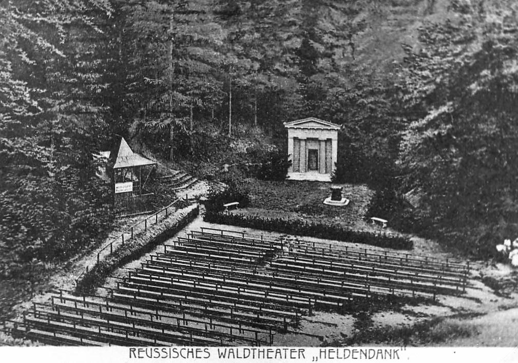 Das Reußische Waldtheater "Heldendank" mit Bühne, Fürstenloge und Zuschauerbänken.